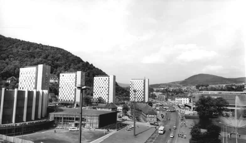 Suhl, Stadthalle, Wohnhochhäuser ADN-ZB Schaar 27-5-74 Suhl: Über 36.000 Einwohner zählt die Bezirksstadt Suhl, in der über ein Drittel der insgesamt 6 500 Neubauwohnungen nach dem VIII. Parteitag der SED geschaffen wurden. Ein Anziehungspunkt im Zentrum der Stadt ist die neue "Stadthalle der Freundschaft" (1.).